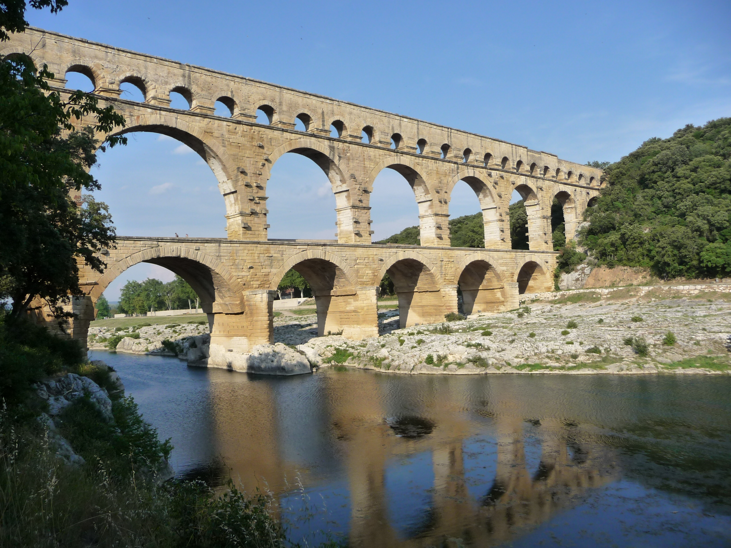 Pont del Gard